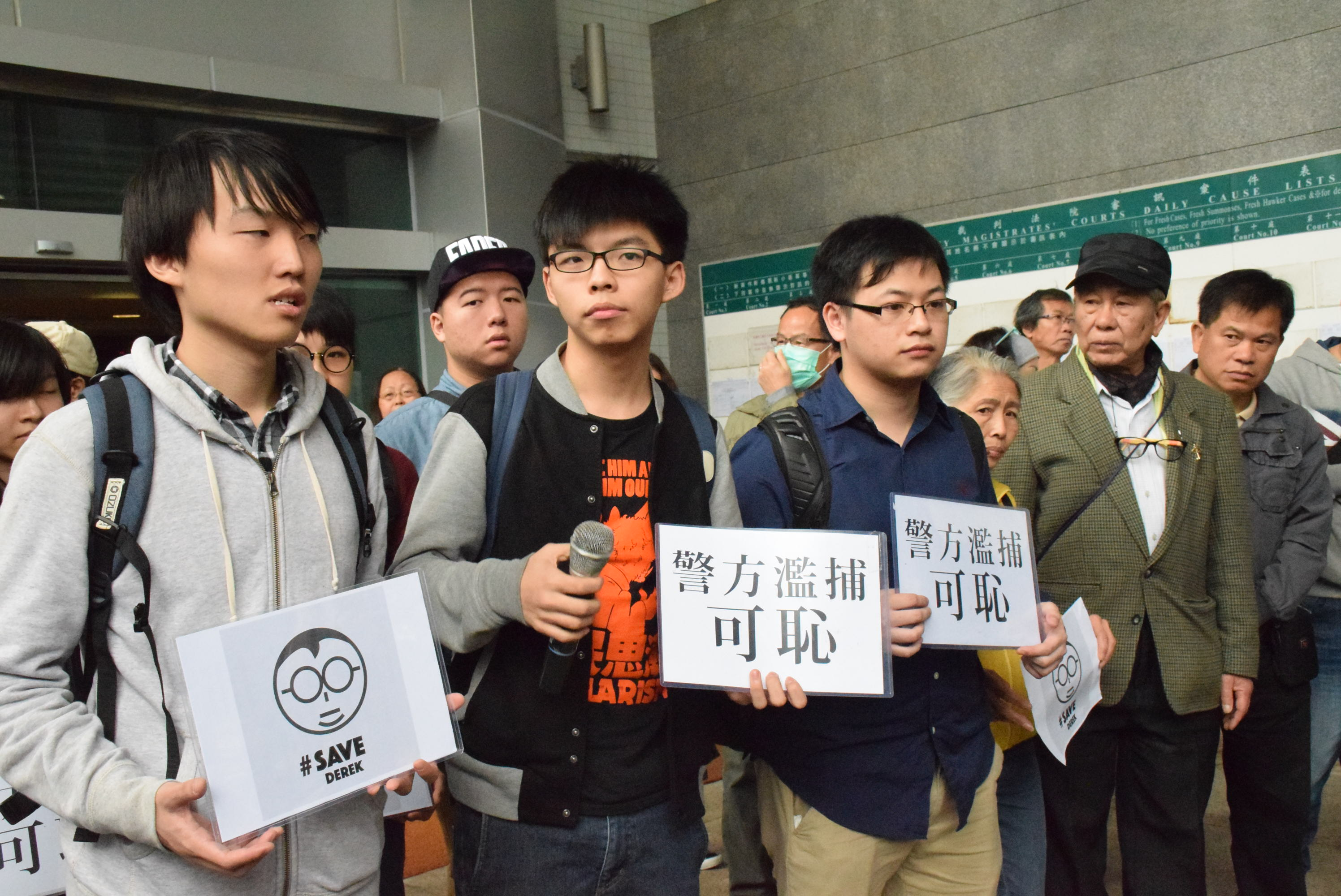 學民思潮召集人黃之鋒等成員成員及其他社運人士，到九龍城裁判法院聲援被捕的林淳軒。